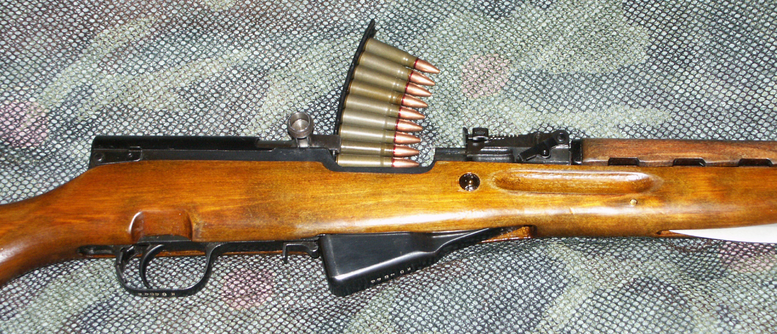 Russian, Tula Arsenal SKS